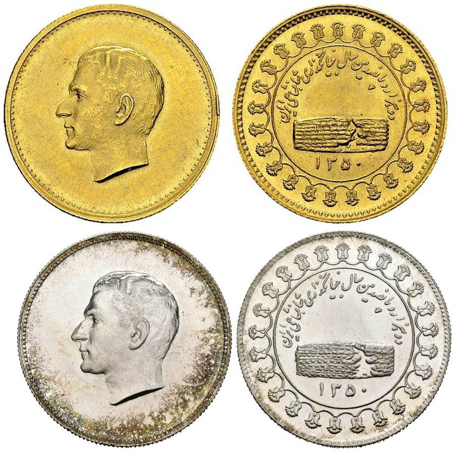 مدالهای یادبود جشنهای دو هزار و پانصد ساله شاهنشاهی از جنس طلا و نقره